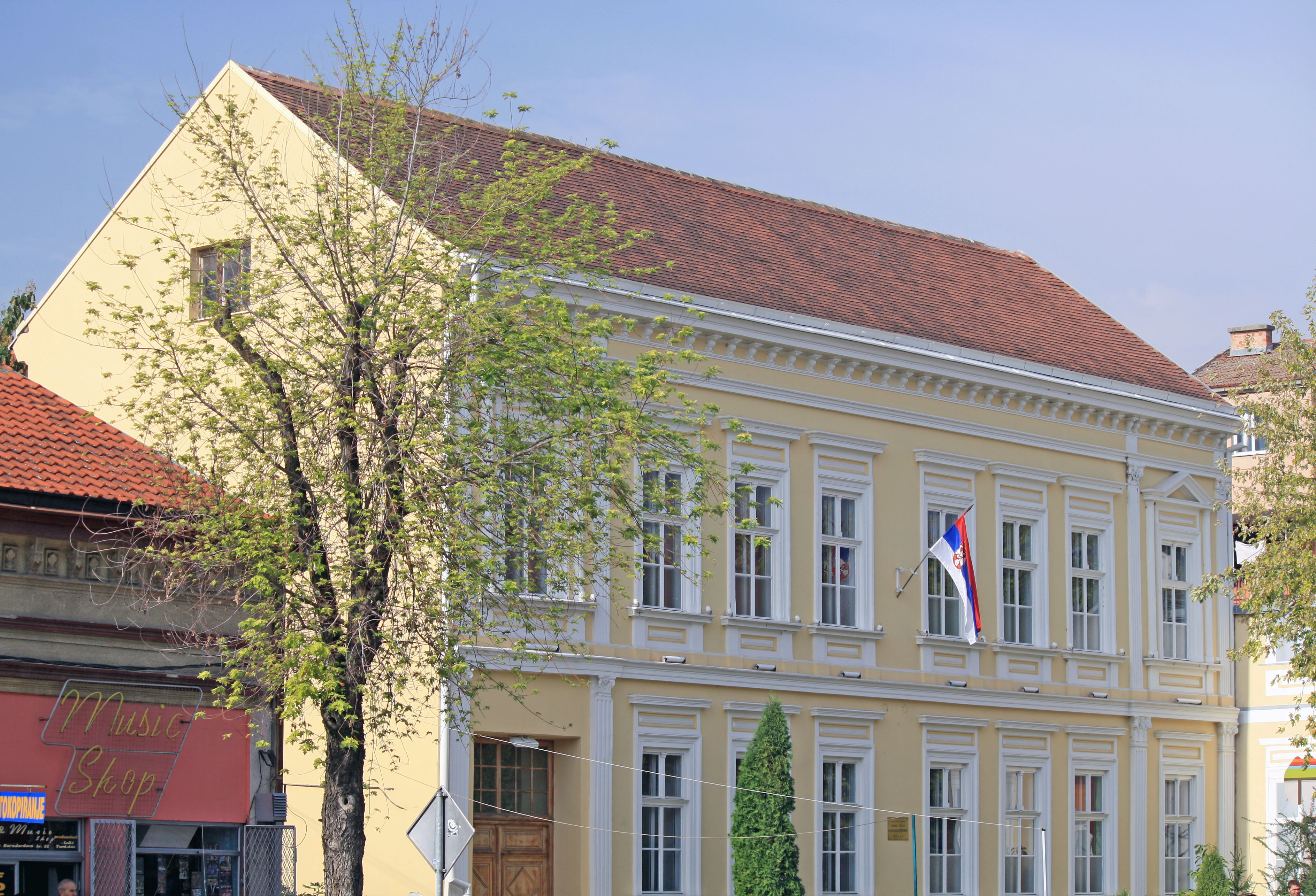 Пошаљи фотографију Зграда Основне школе „Јанко Веселиновић“ у Шапцу, улица Карађорђева број 48.